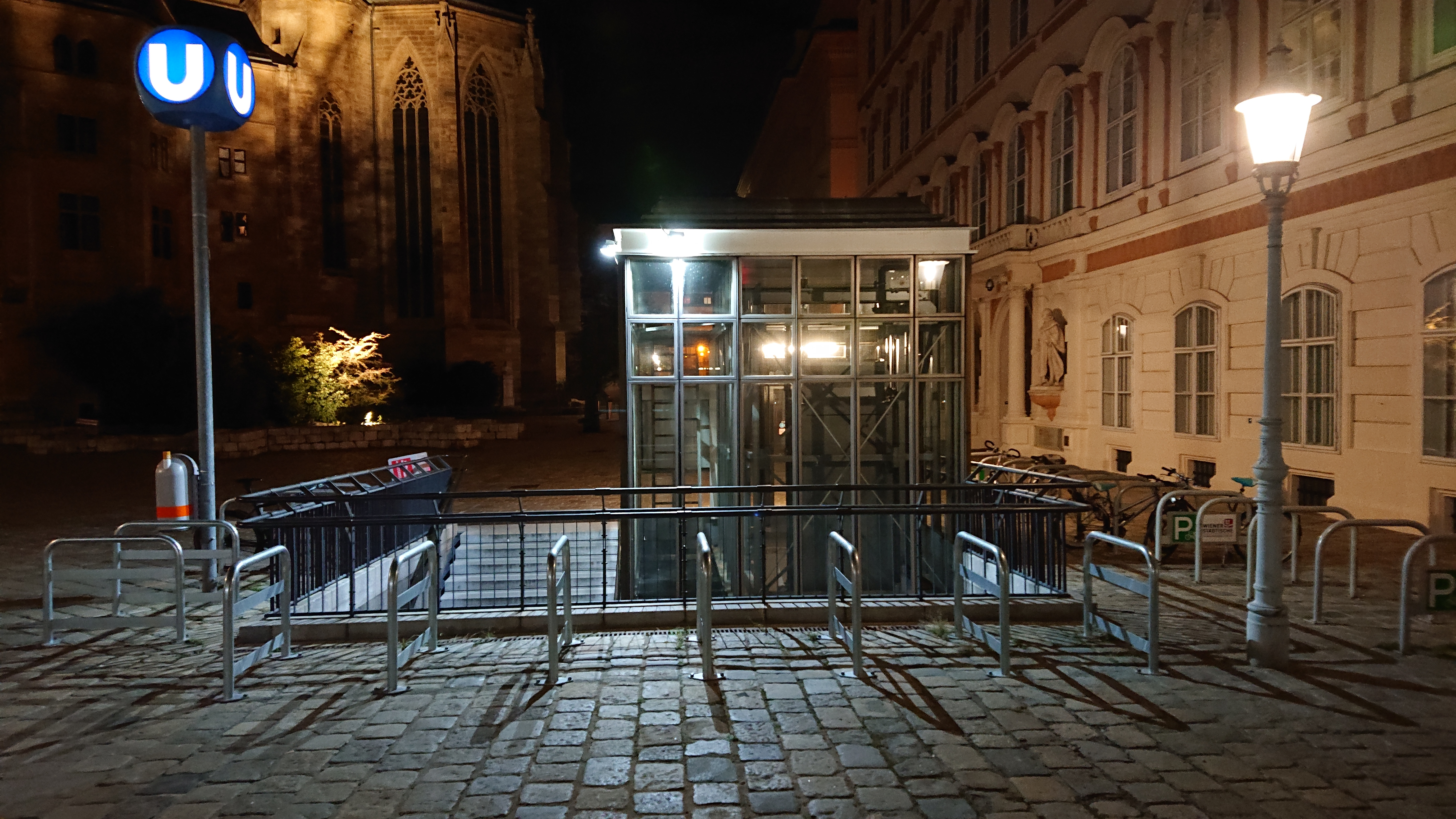 U-Bahn-Station Herrengasse (U3)